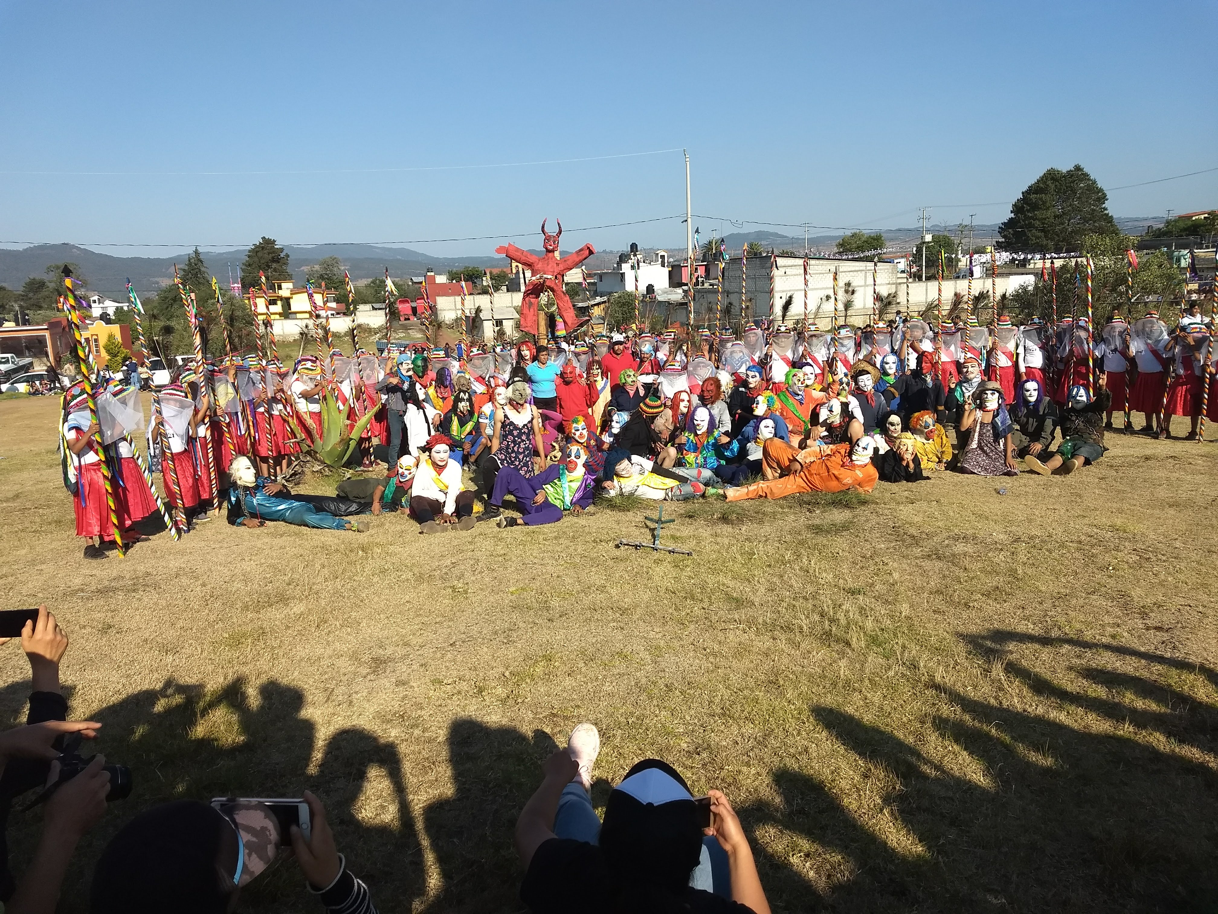 Robenos 2018